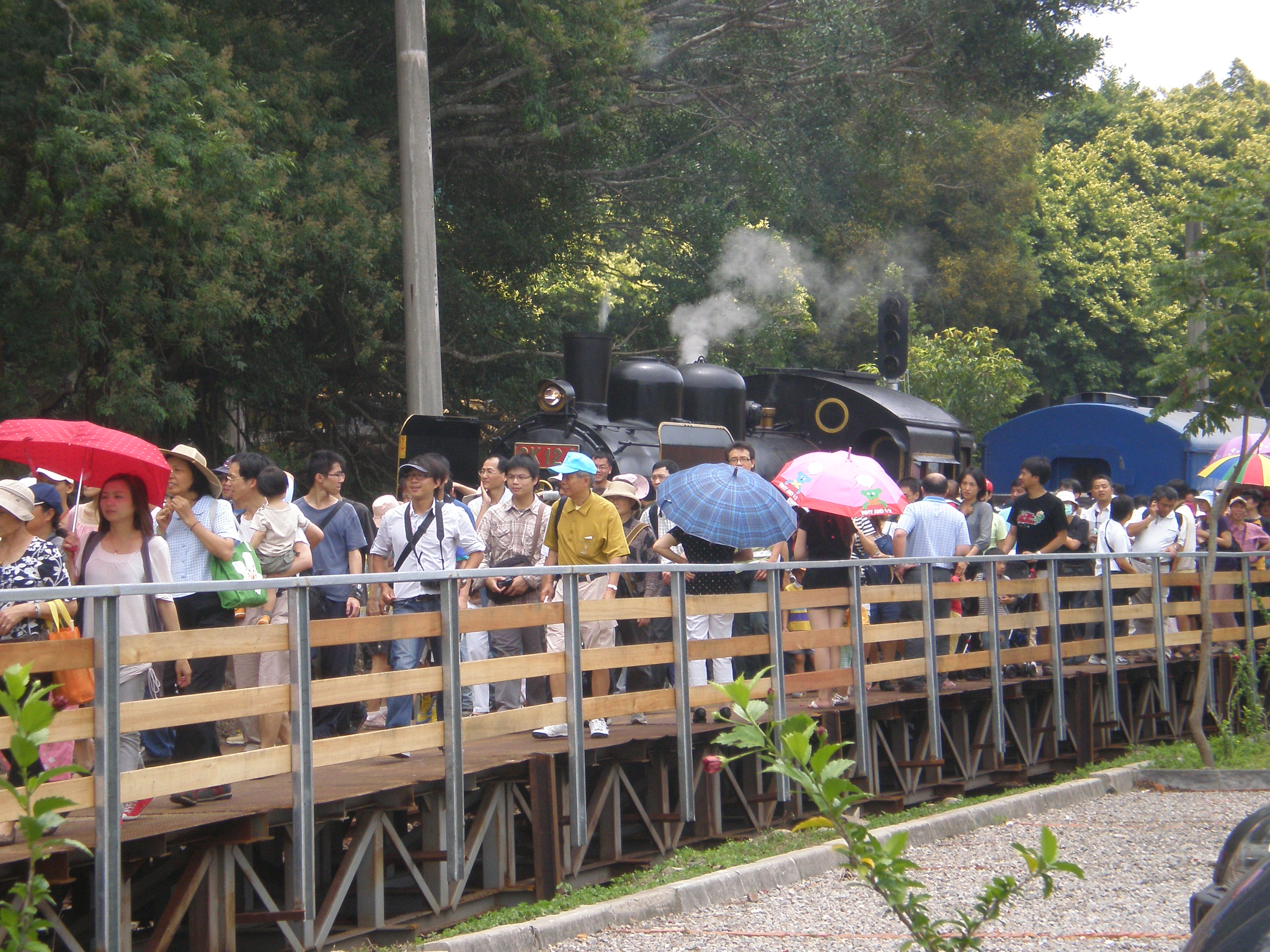 2010年舊山線復駛活動中的魚藤坪車站